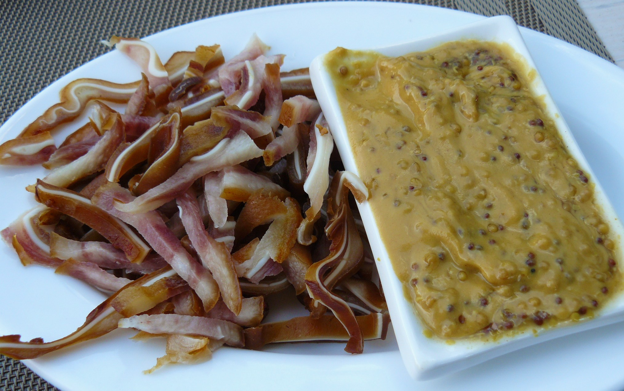 Mariupol. Wędzone świńskie uszy z musztardą.